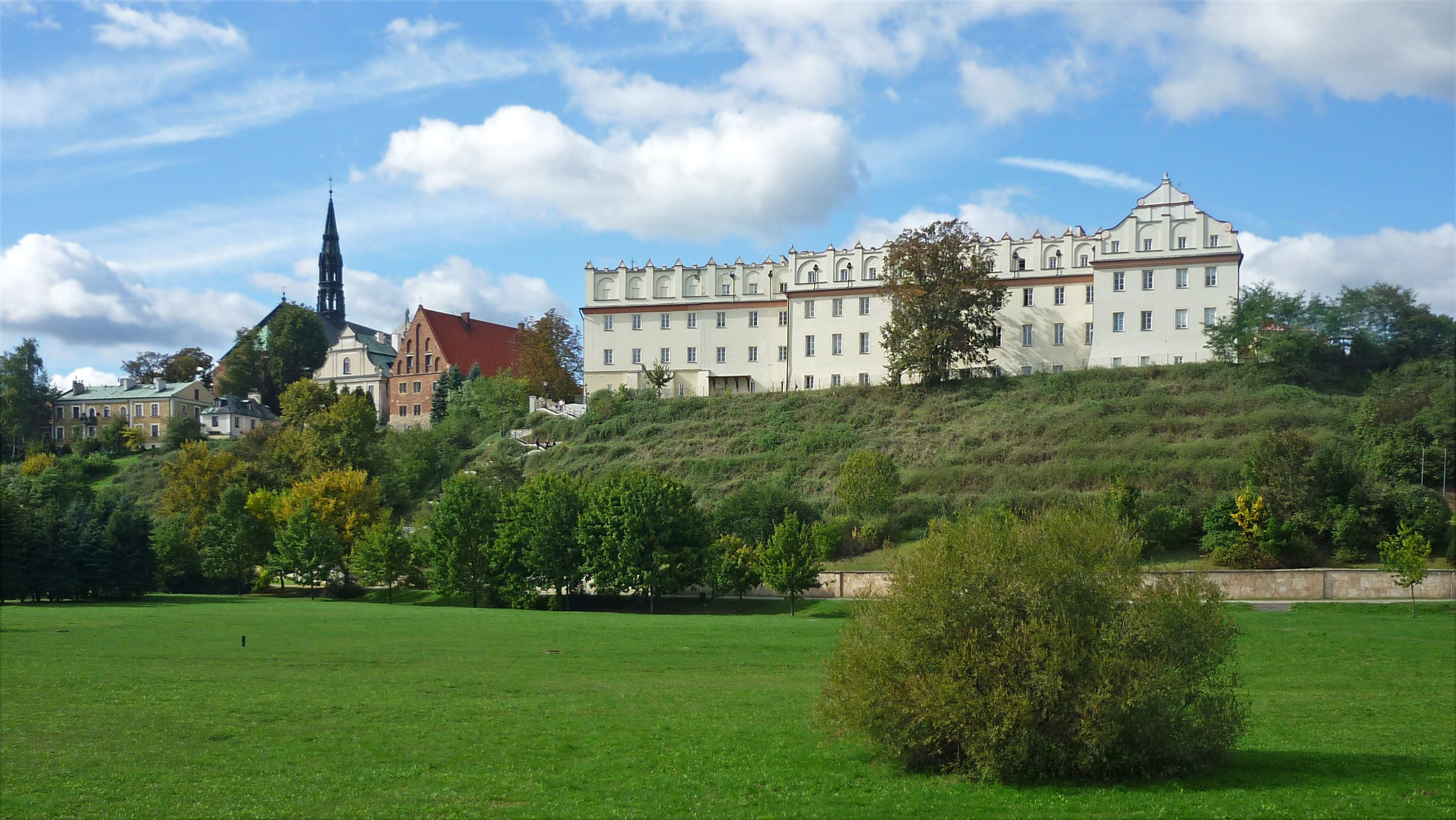 Collegium Gostomianum (ehem. Jesuitenkollegium) von Sandomierz